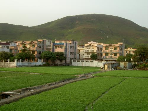 Chau Tau Village, Wai Lap Man